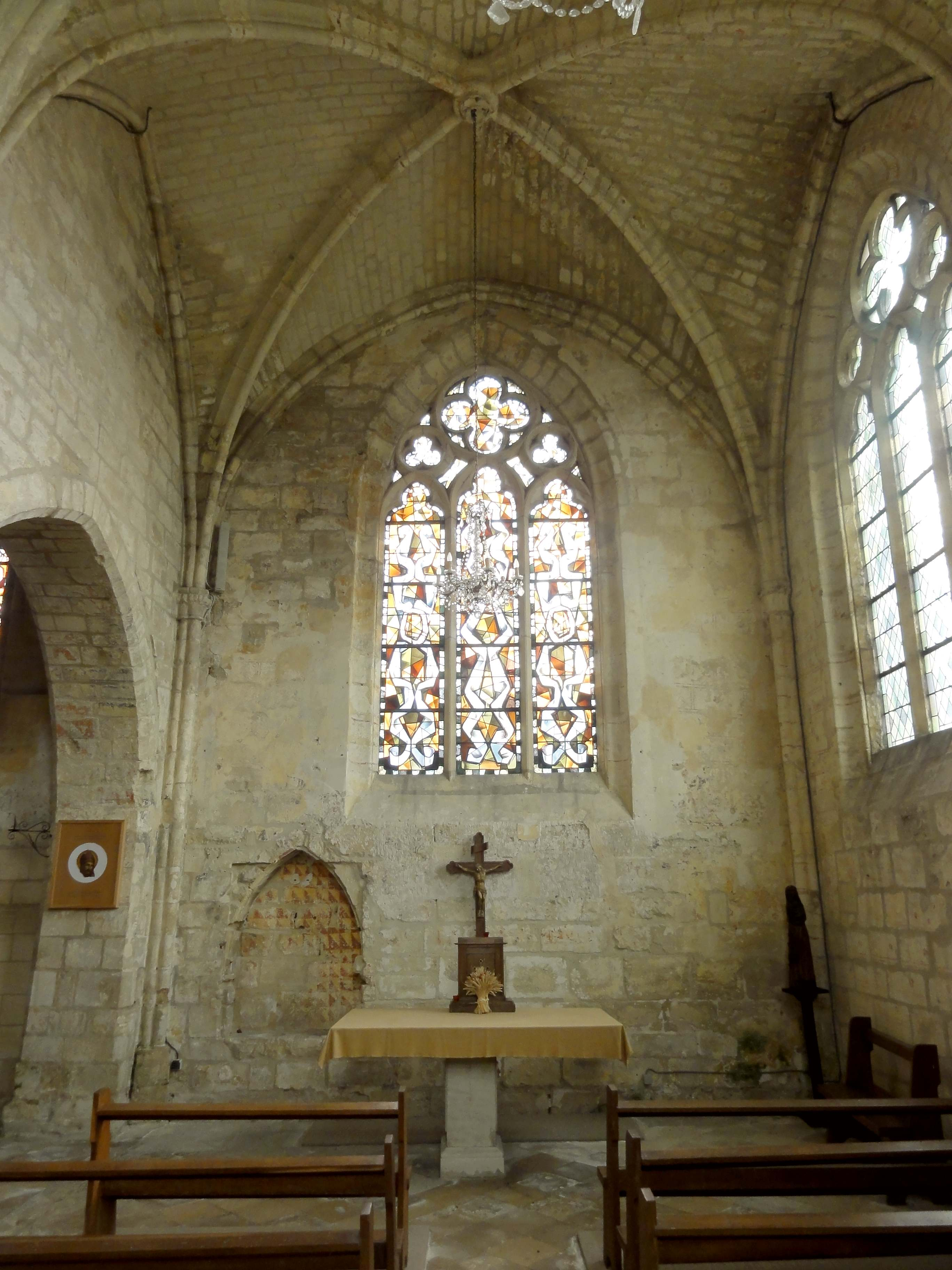 Intérieur de l'église (voir titre).